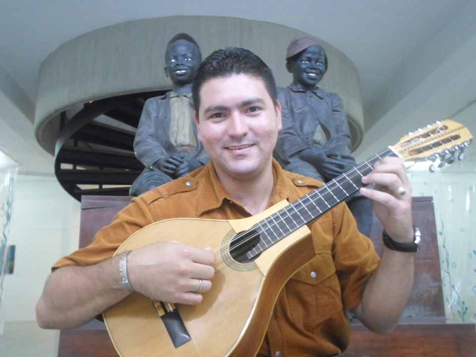 Antonio Elias Facure Cova, músico de amplia trayectoria y ejecutante de la Bandola Oriental, entre otros instrumentos de cuerda. Fotografia en el Ateneo de Carúpano - Edo. Sucre - Venezuela.